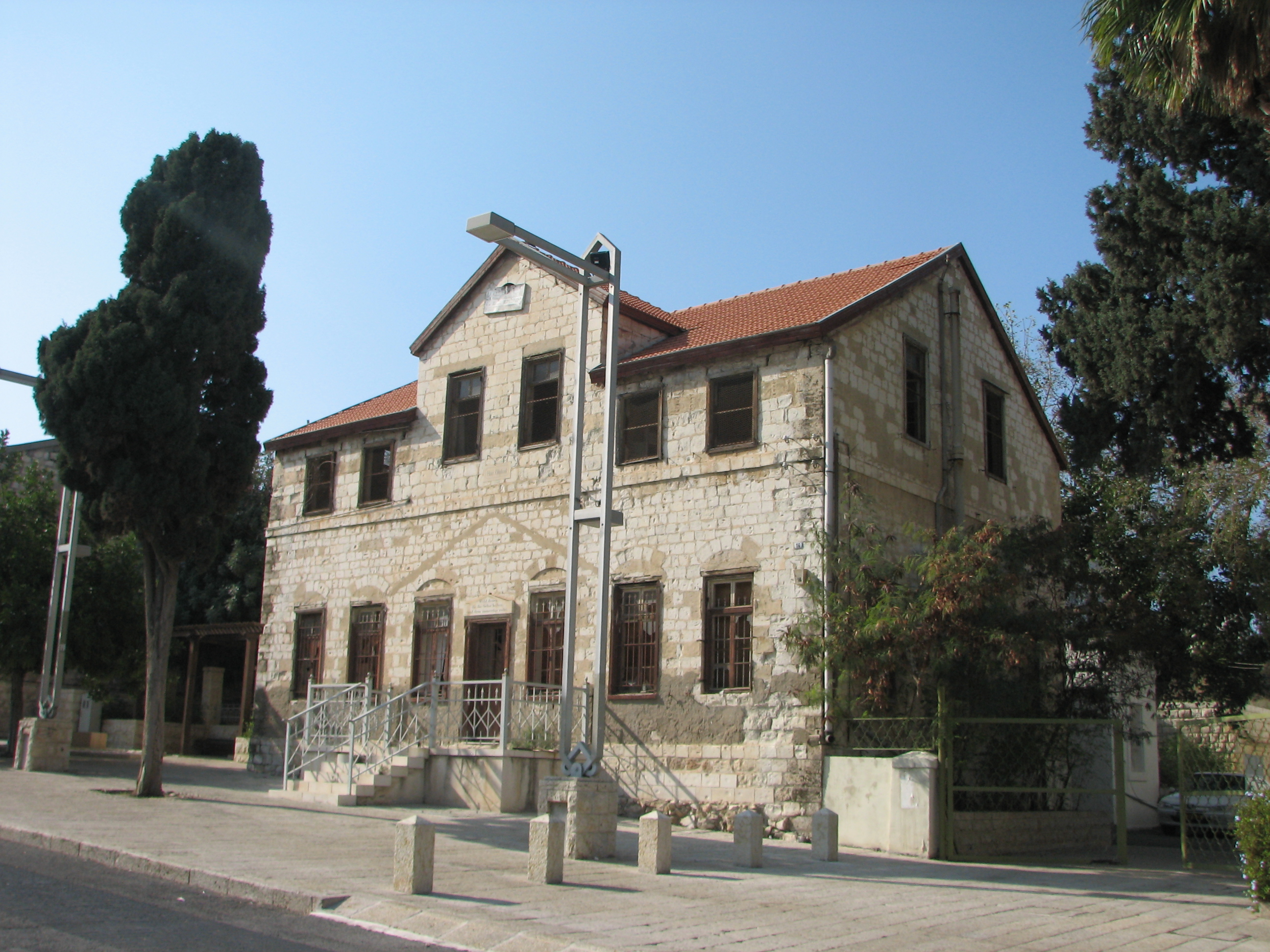 Beit Oliphent, Haifa. The house of Laurence Oliphant . בית אוליפנט במושבה הגרמנית בחיפה שדרות בן גוריון 16 ביתו של לורנס אוליפנט חזית הבית לשדרות בן גוריון